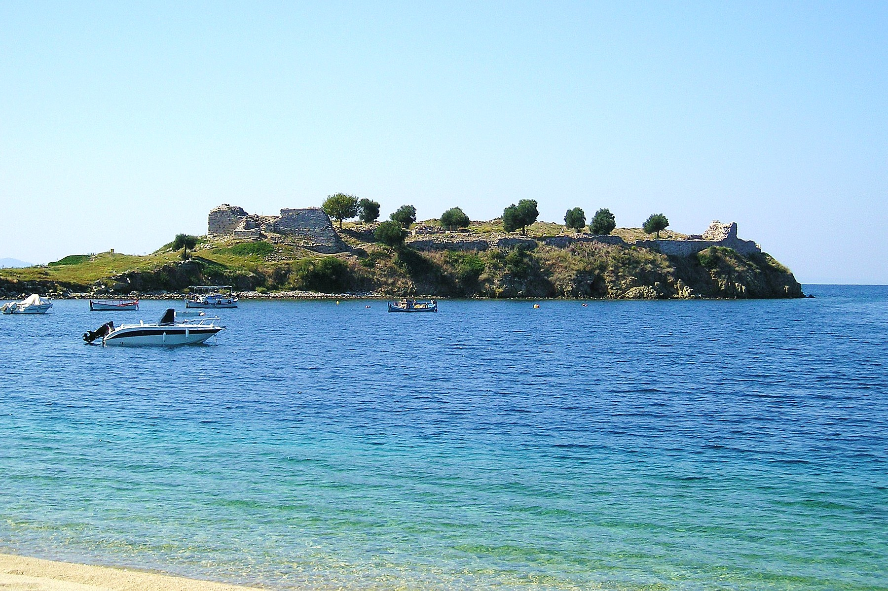 Halbinsel Lykithos mit den Resten des antiken Toroni